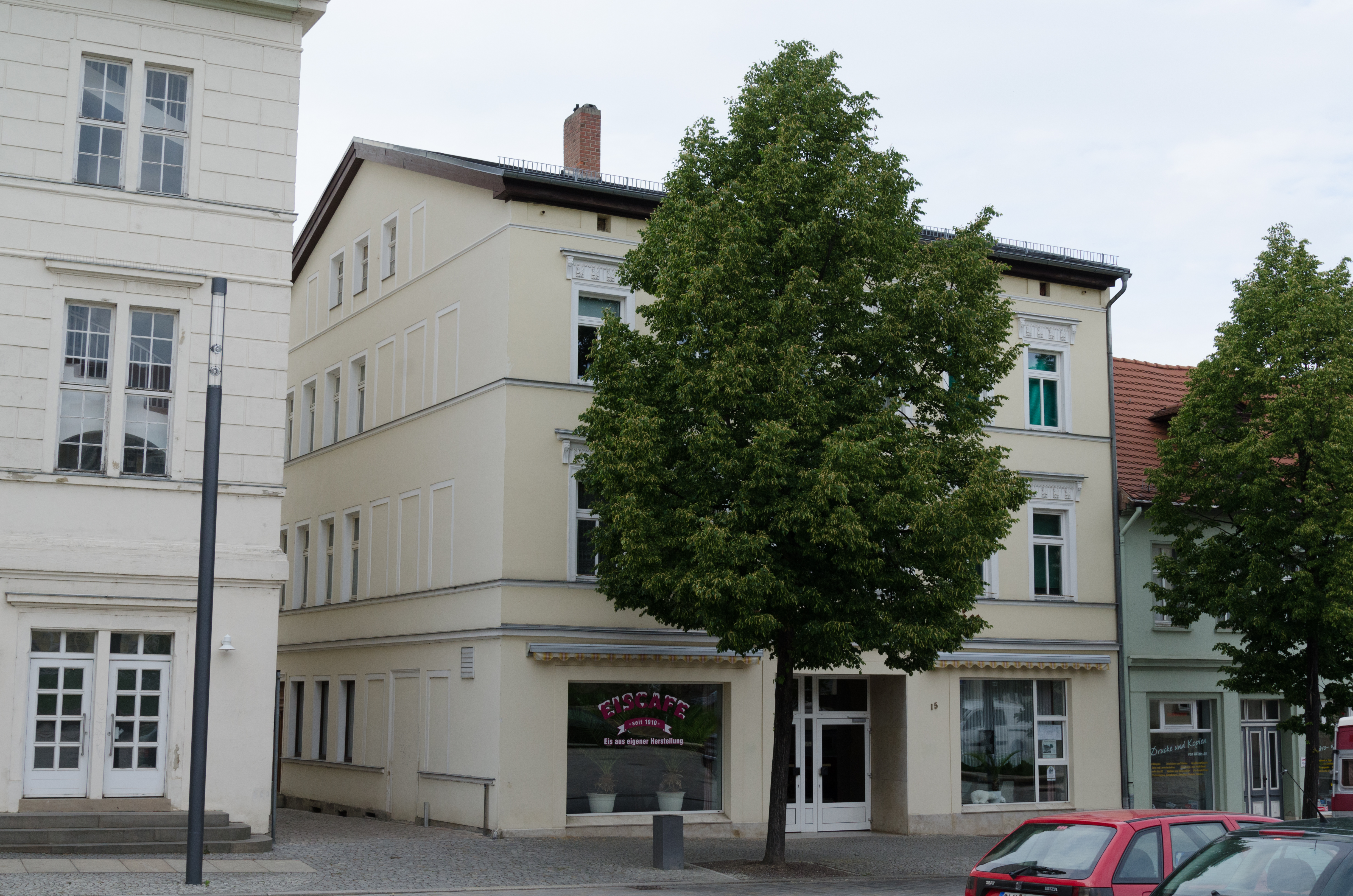 Zeitz, Altmarkt 15